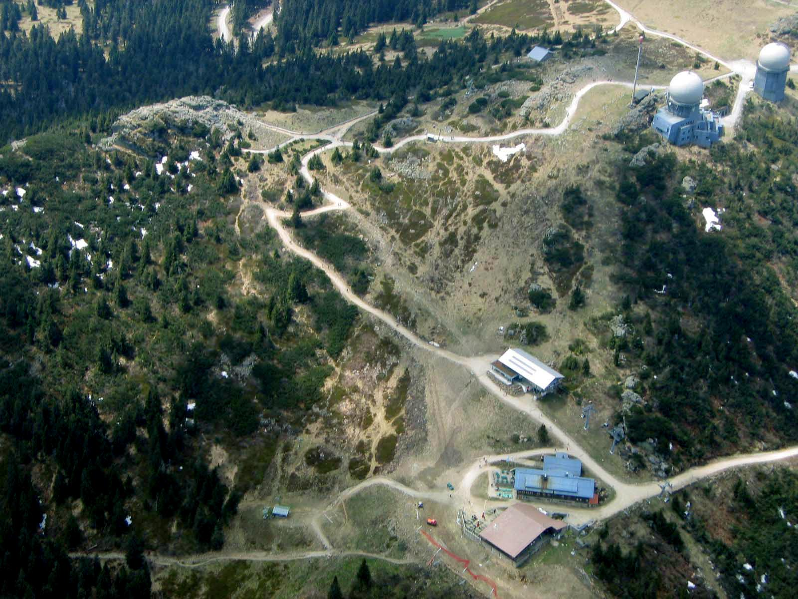 Luftbild des Berges Großer Arber